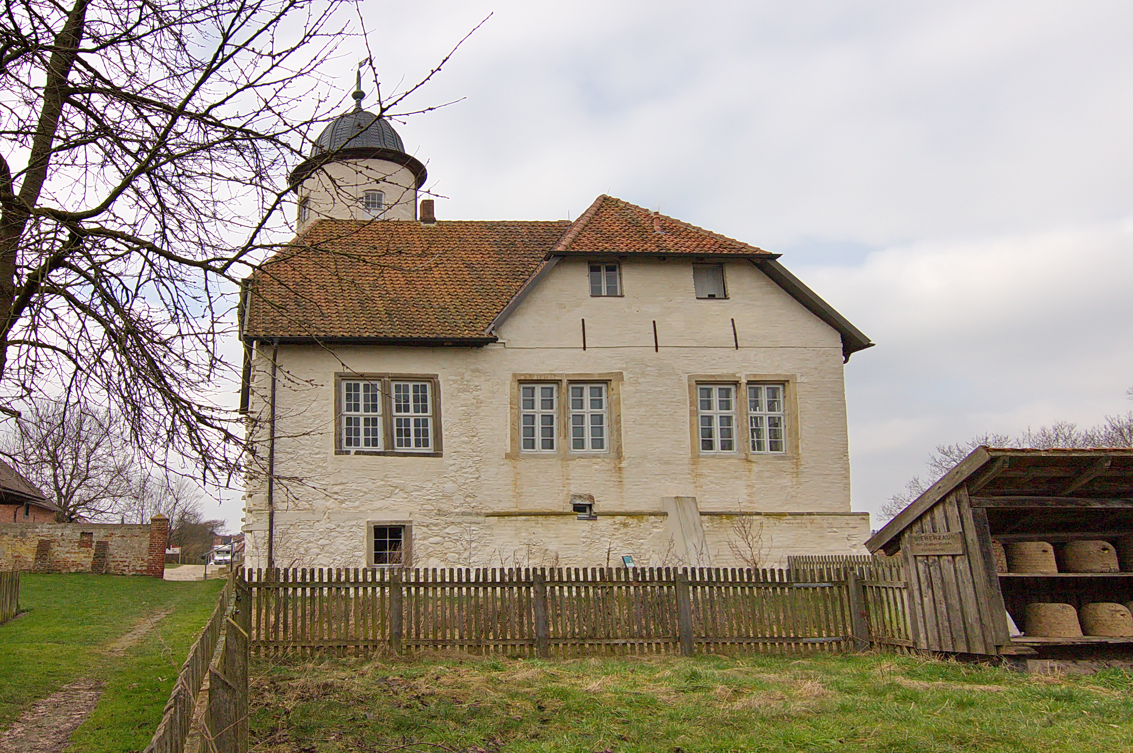 Burg Brome in Brome, Niedersachsen, Deutschland